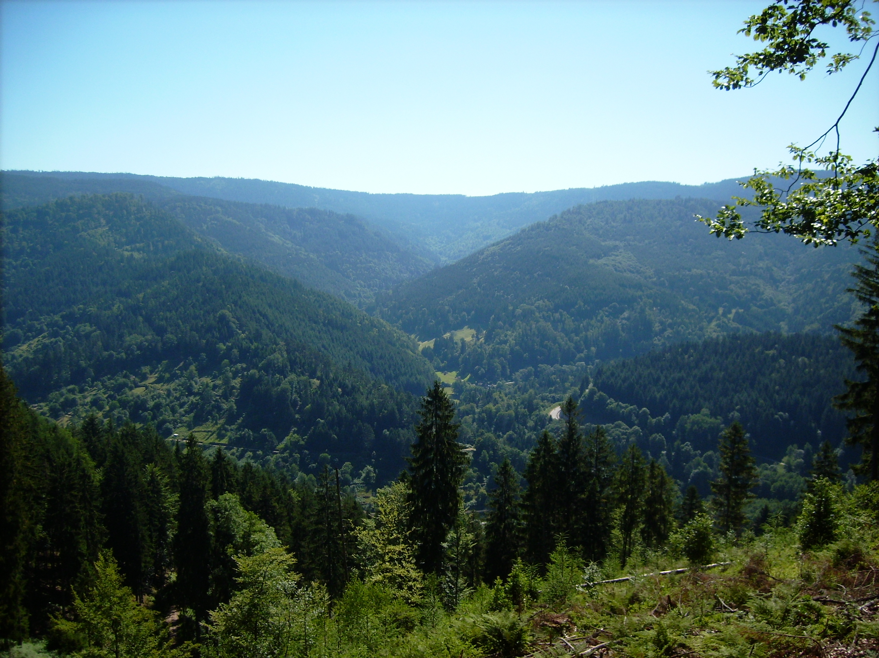 Das Murgtal im Nordschwarzwald bei Forbach/Baden, Blick ins Sasbachtal